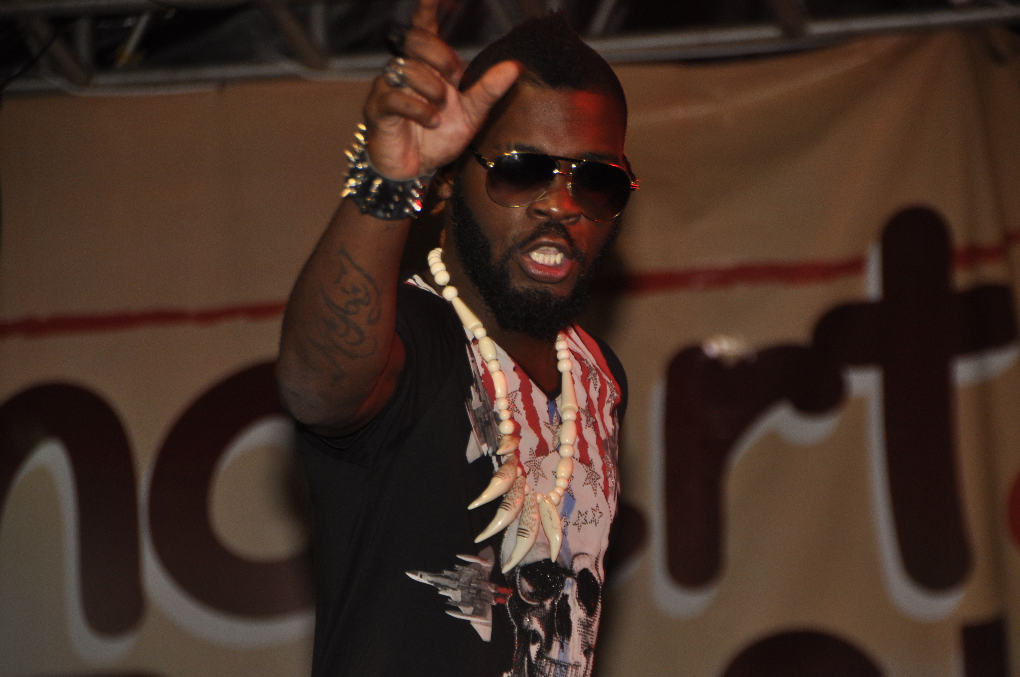 Arafat Dj le, chanteur ivoirien de coupé- decalé, lors d'une prestation artistique This is an image from Ivory Coast